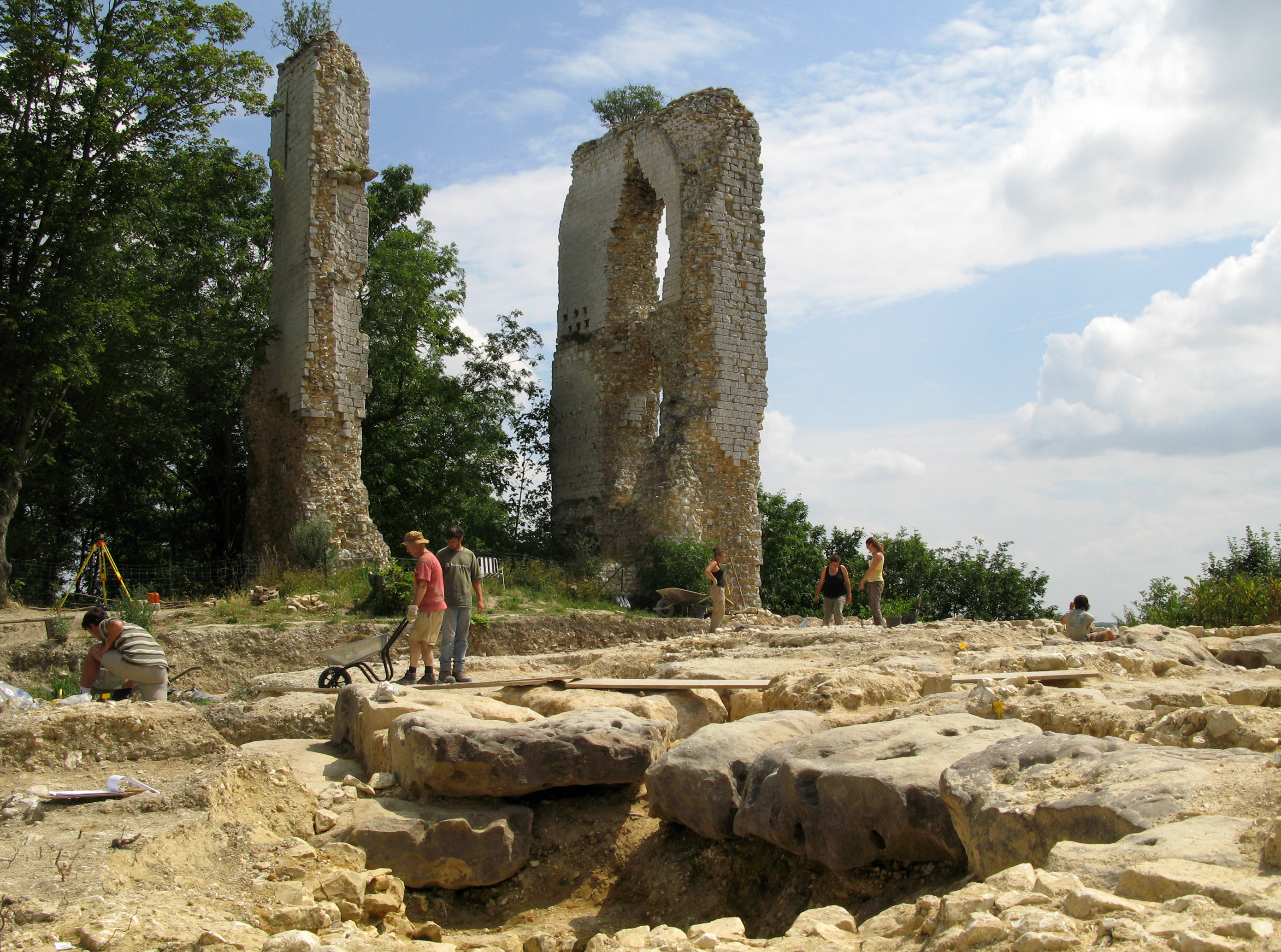 Boves (Somme, France) - Vue lors de la visite guidée des fouilles du samedi 26 juillet 2008 après-midi. A l'arrière-plan, les 2 pans opposés d'une tour carrée se dressent en bordure de la motte. Au premier plan, les archéologues ont mis à jour un alignement de gros blocs plats de grès.